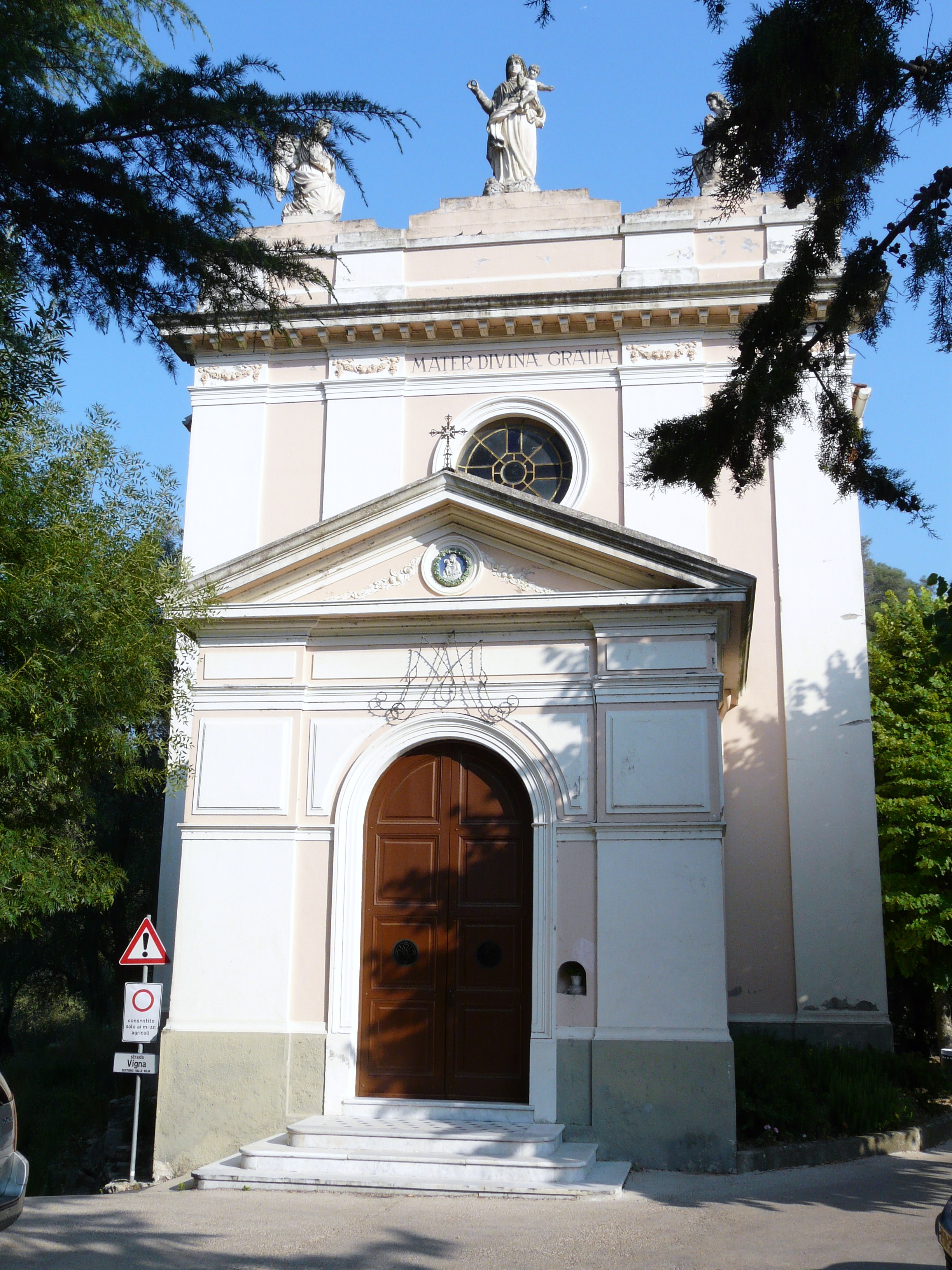 Santuario di Nostra Signora delle Grazie, Airole, Liguria, Italia